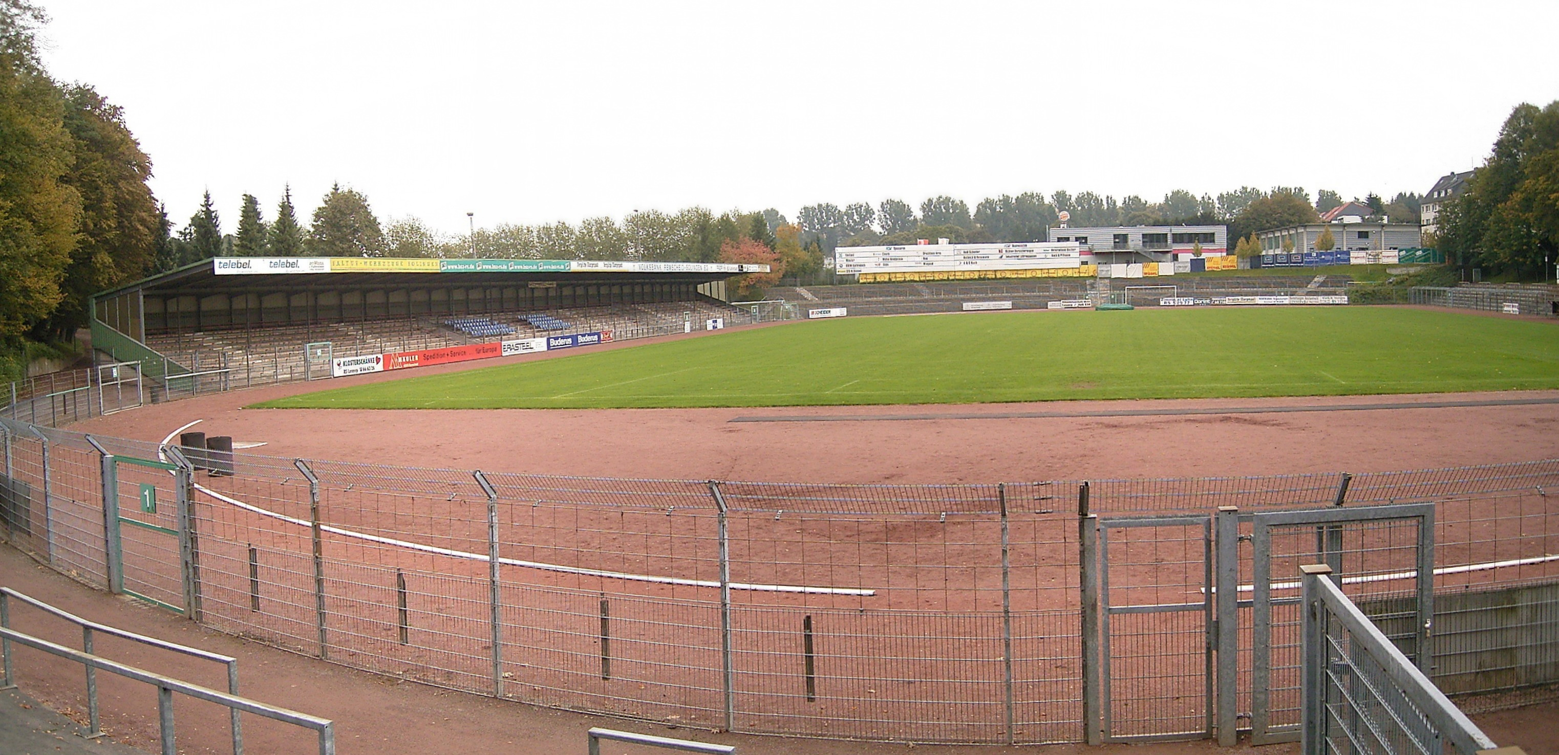 Röntgenstadion in Remscheid-Lennep